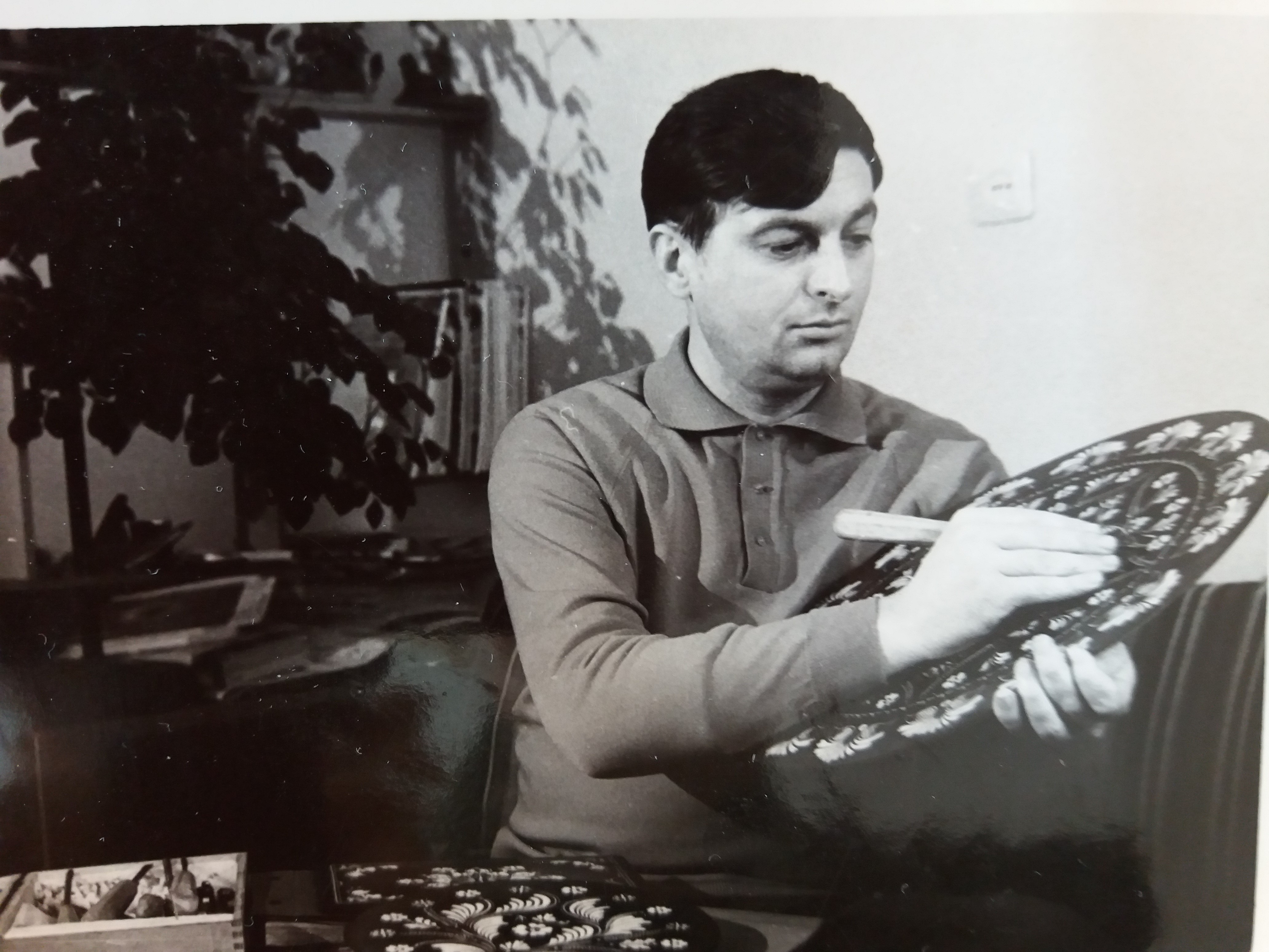 Фото з архіву родини Канарчиків